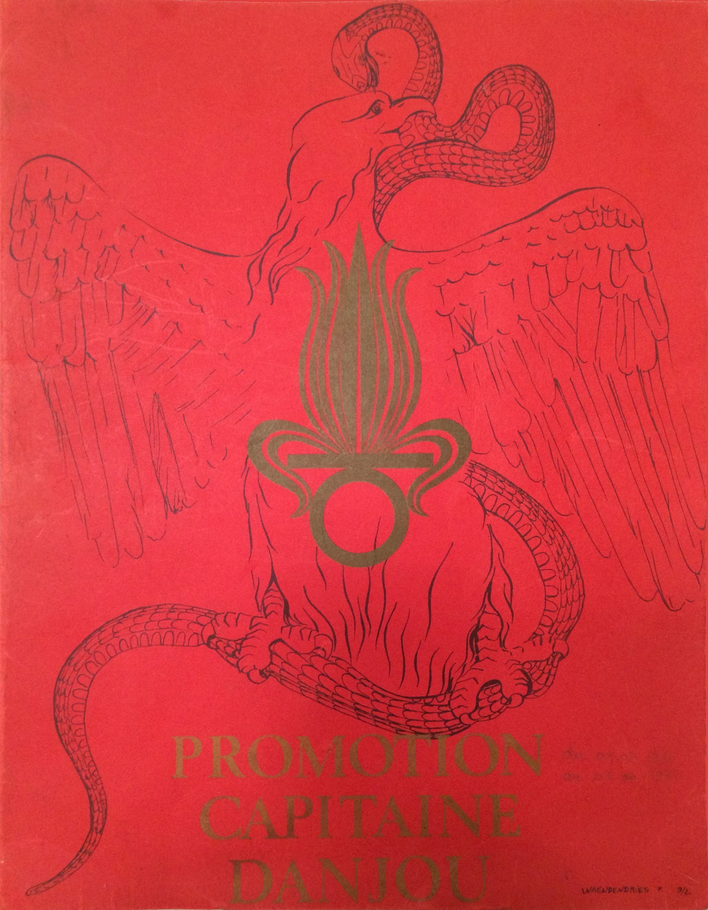 Couverture de la plaquette de la promotion du bataillon EOR de l'ESM Saint-Cyr Coëtquidan de 1971, peloton 102, baptisée «Capitaine Danjou» (Document personnel de Alain Darles)